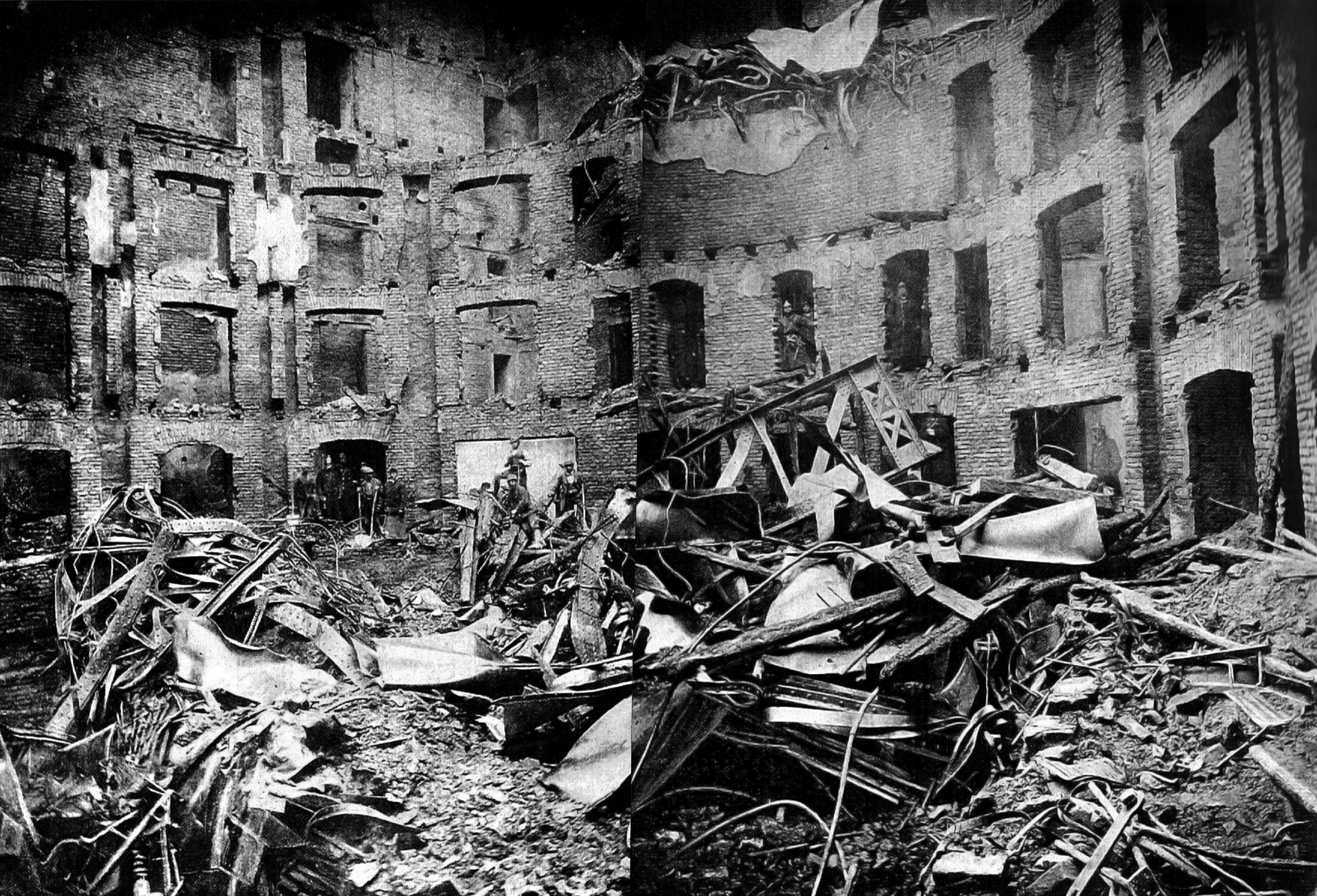 Die Brandruine des Ringtheaters am Schottenring 7 in Wien am 8. Dezember 1881